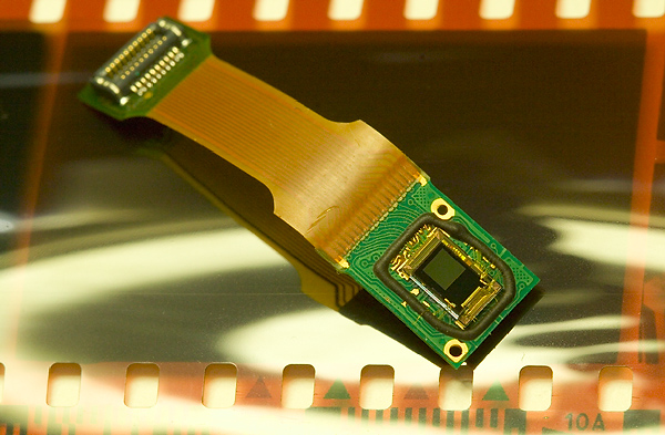 Цифровая матрица фотоаппарата встраиваемого в сотовые телефоны в сравнении с обычным кадром 35 мм плёнки